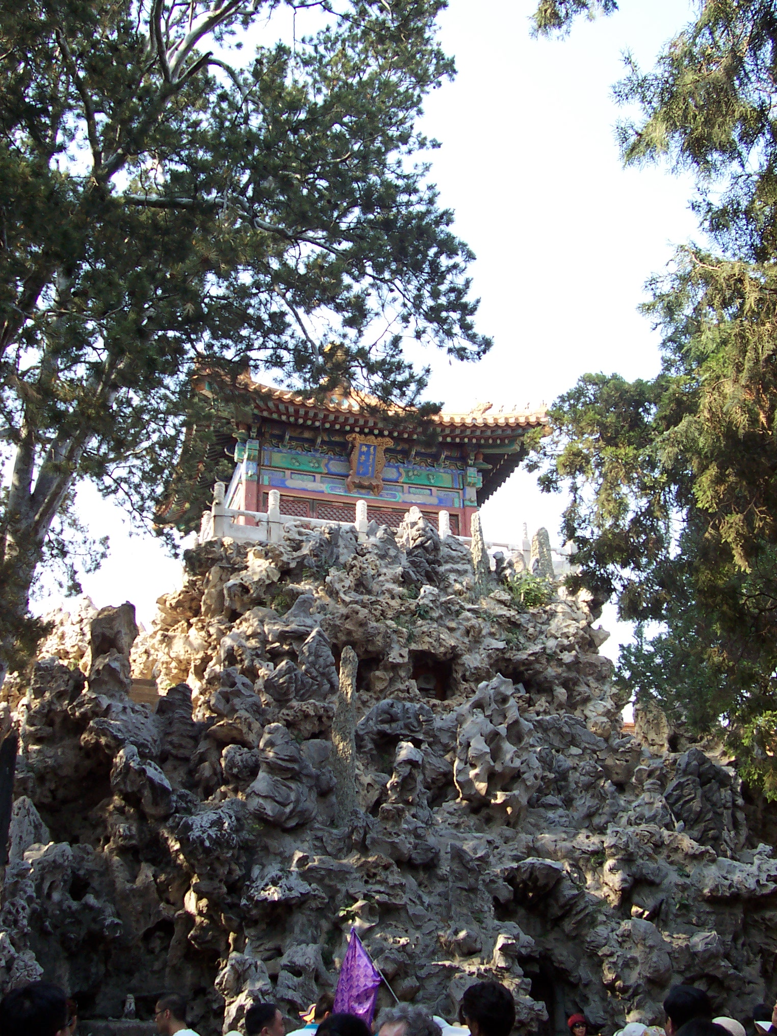 北京故宫御花园